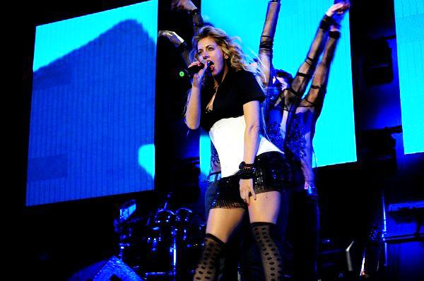 Catalina Palacios durante un concierto en Chile.